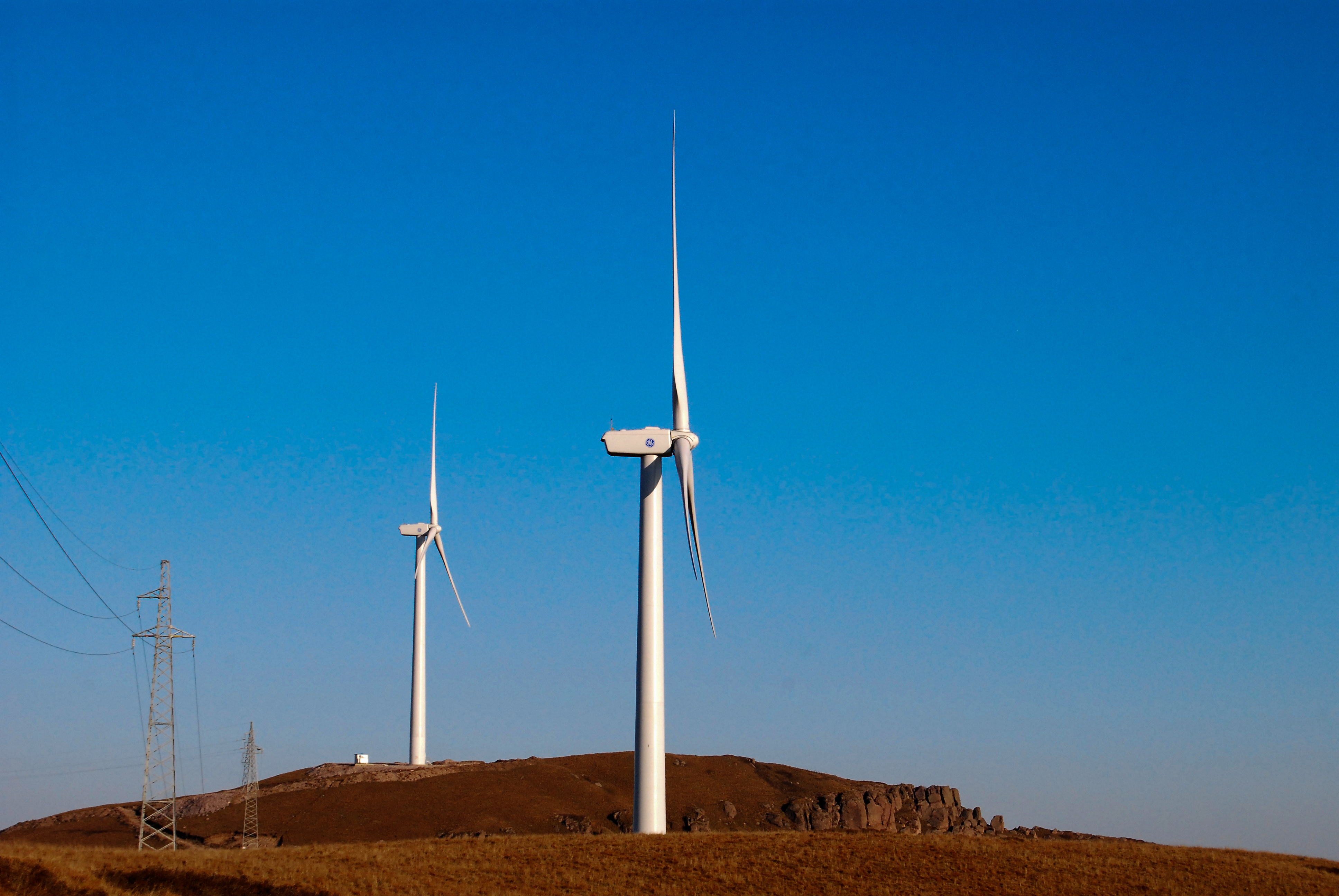 西甸子梁风车